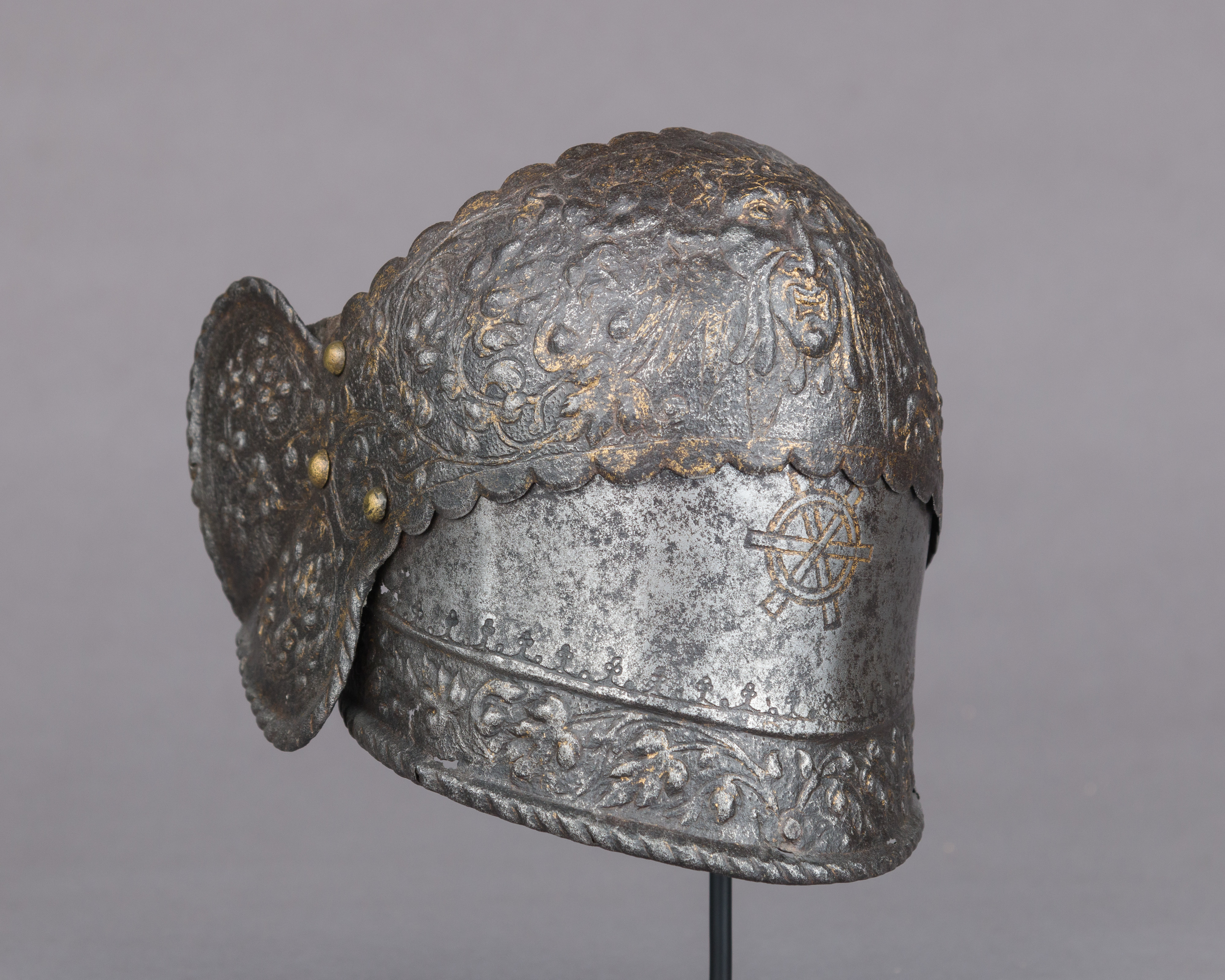 French; Right poleyn (knee defense); Armor Parts-Knee Defenses